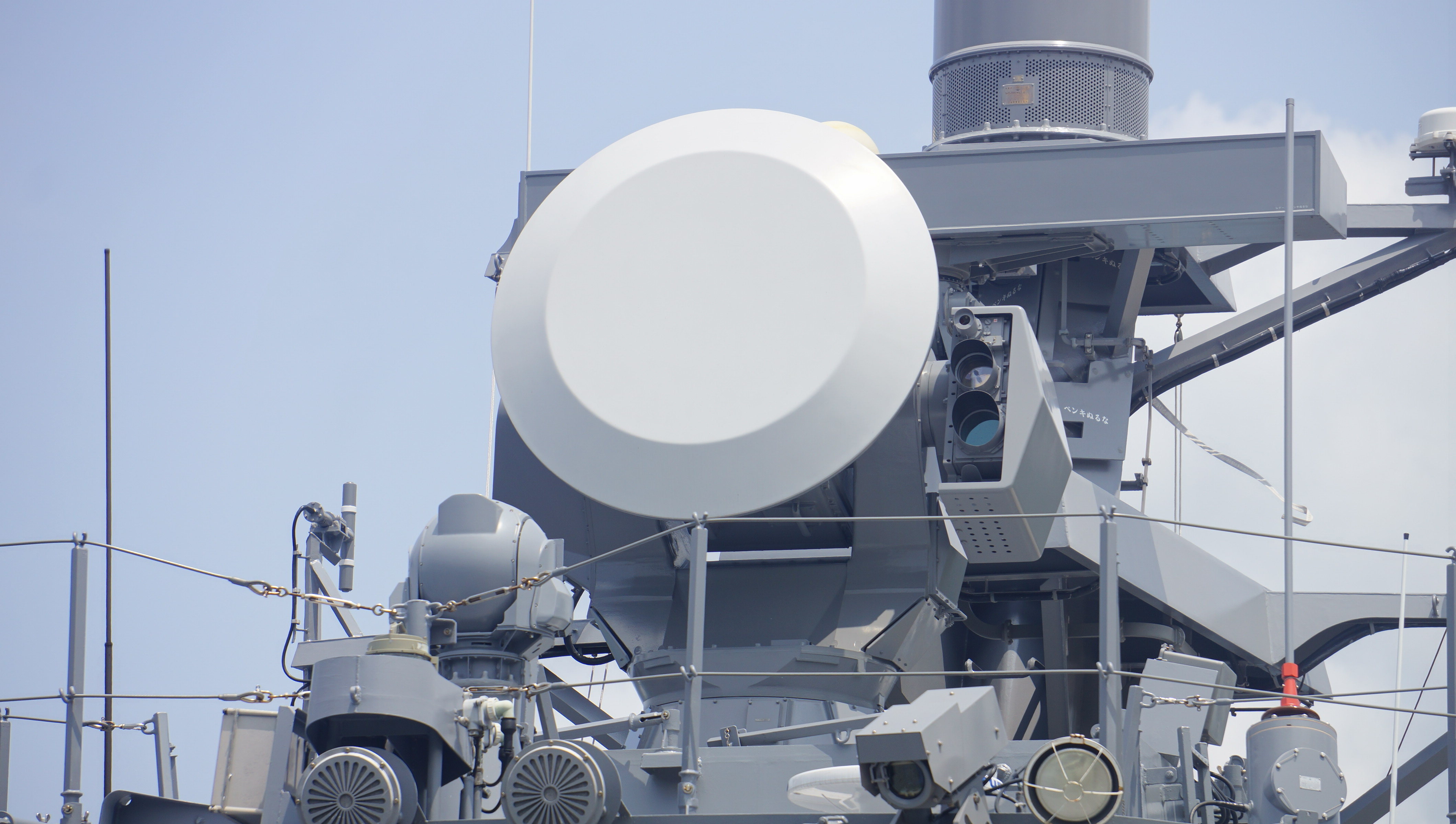 海上自衛隊 ミサイル艇はやぶさ（PG-824） 81式射撃指揮装置2型31。 14年7月27日 舞鶴基地にて。